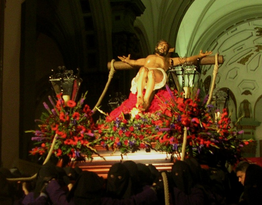 Cristo del Socorro (Cartagena)